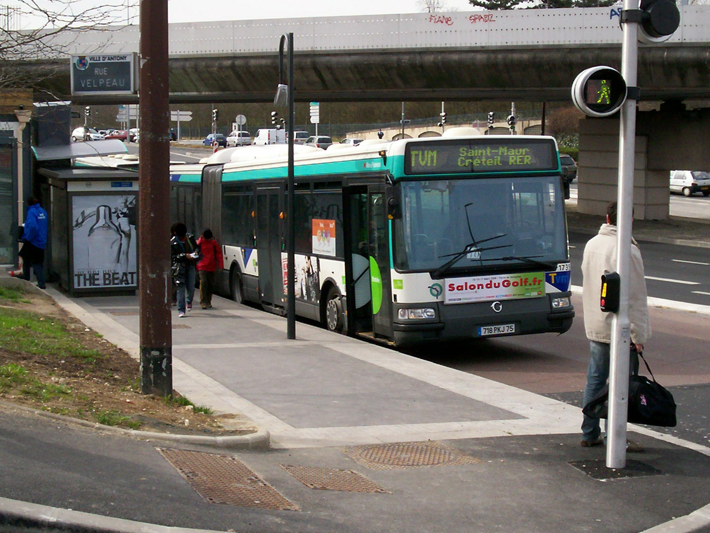 Autre bus TVM en arrêt origine de La Croix de Berny RER